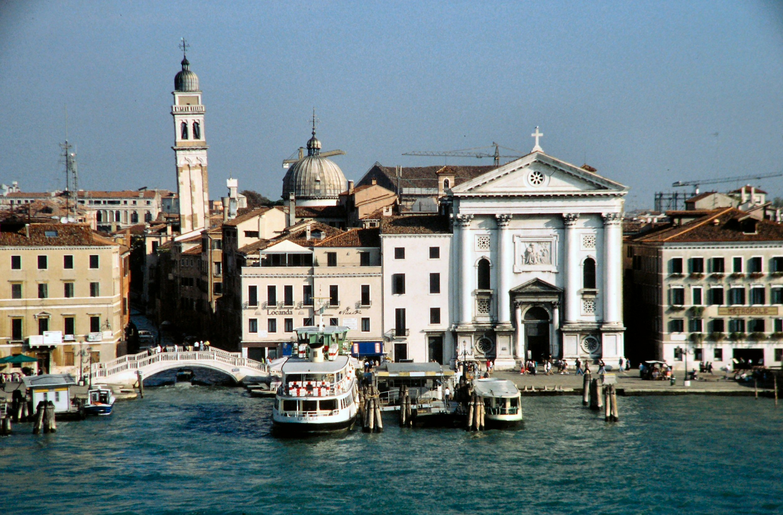 Santa Maria della Pieta, Kirche in Venedig